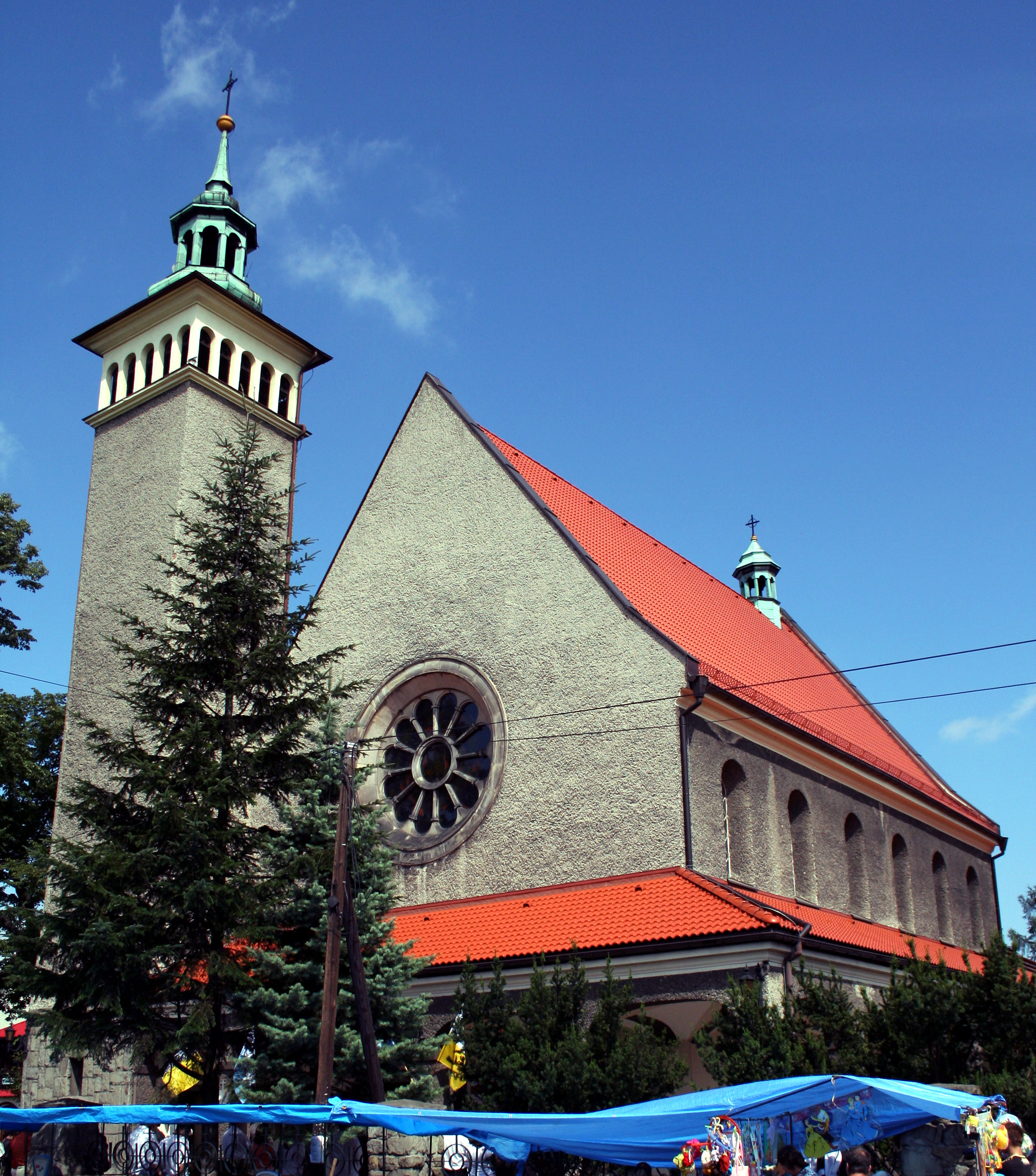 kościół św. Bartłomieja w Pogrzebieniu, gmina Kornowac